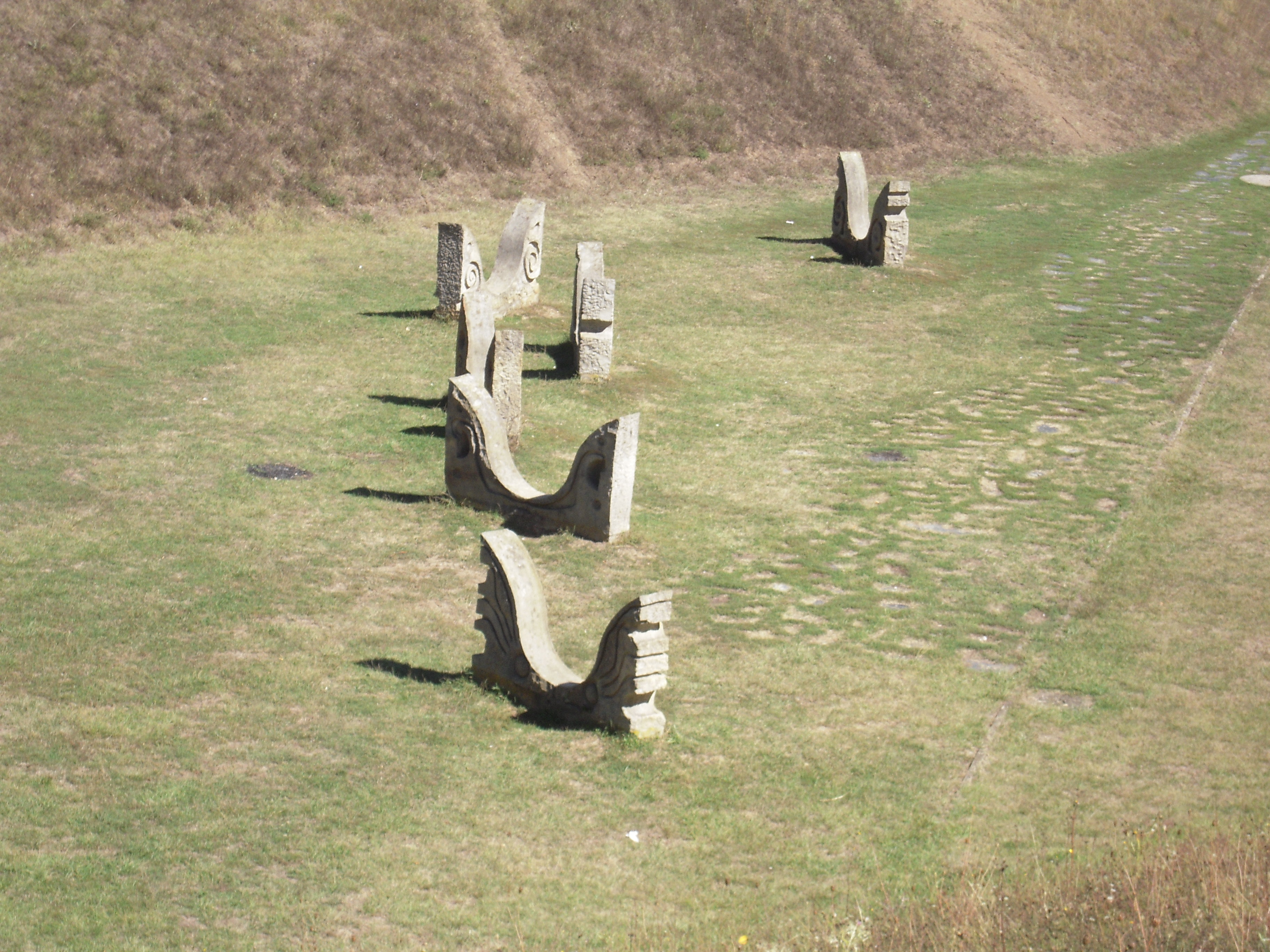 Меморијални комплекс „Слободиште“ у Крушевцу